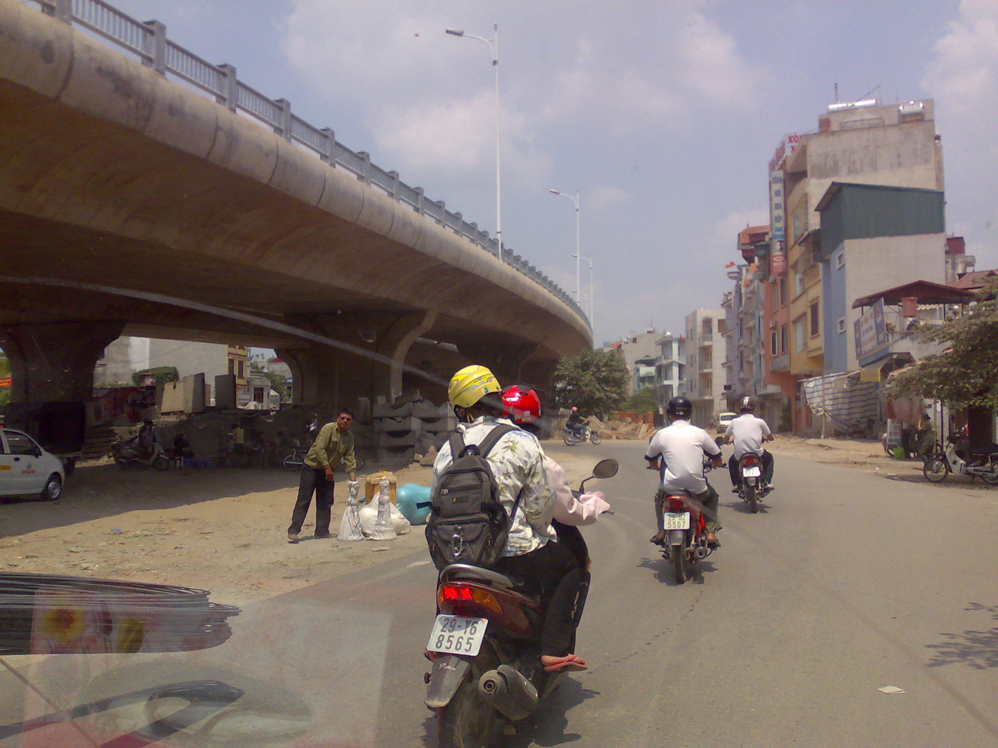 Thể loại:Cầu Hà Nội